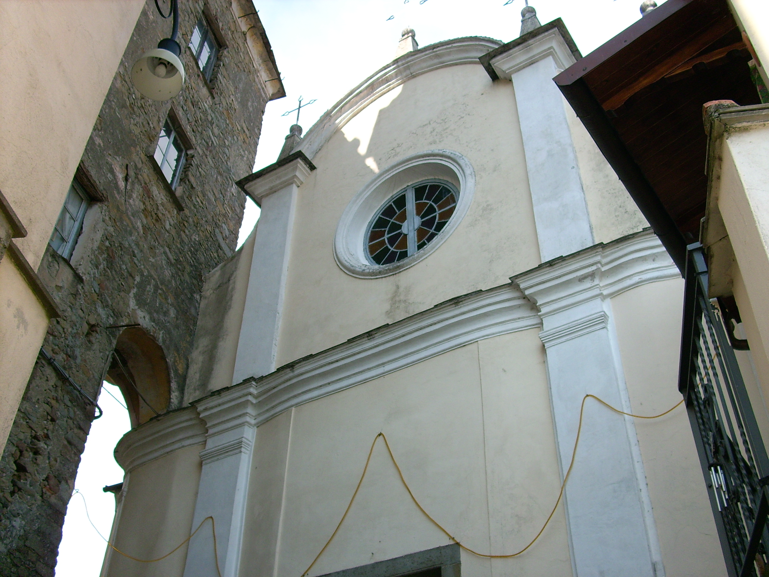 Chiesa di Beverino Castello, Liguria, Italia